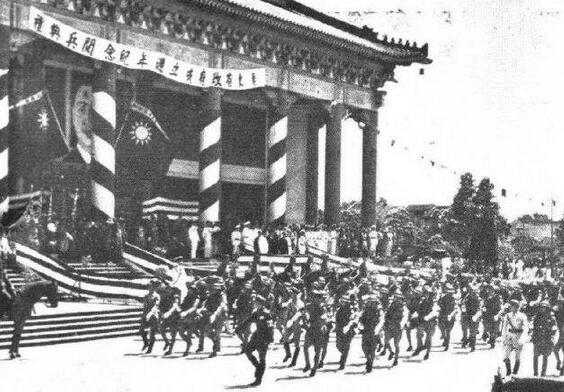 南京国民政府の閲兵式